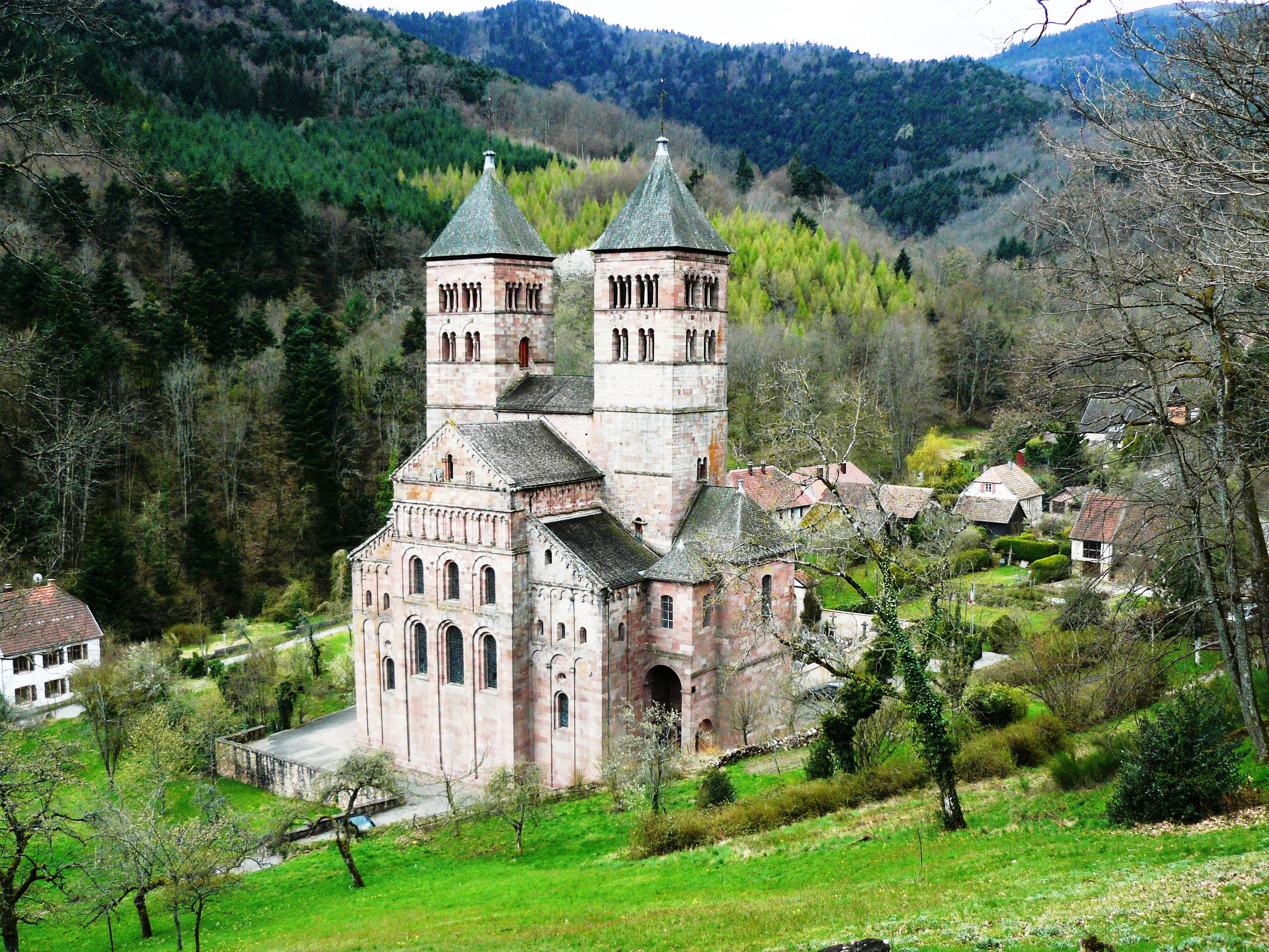 Murbach 051.JPG